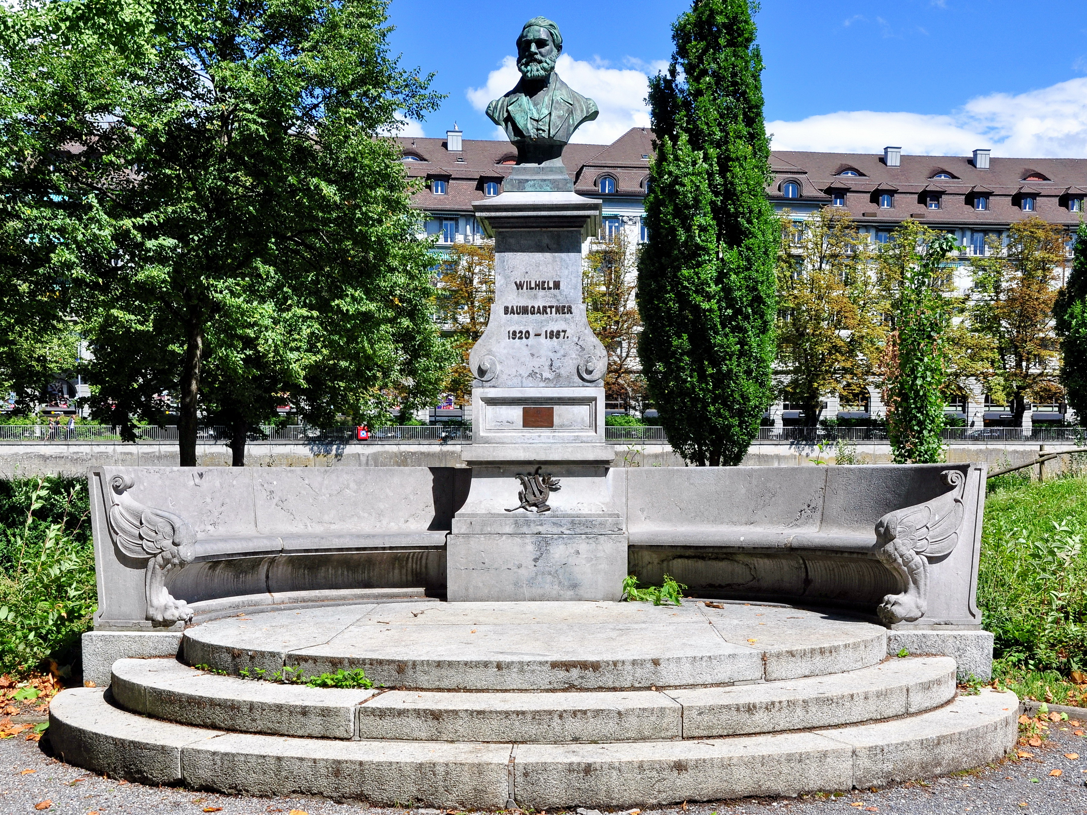 Wilhelm Baumgartner memorial, Platzspitz park in Zürich (Switzerland)